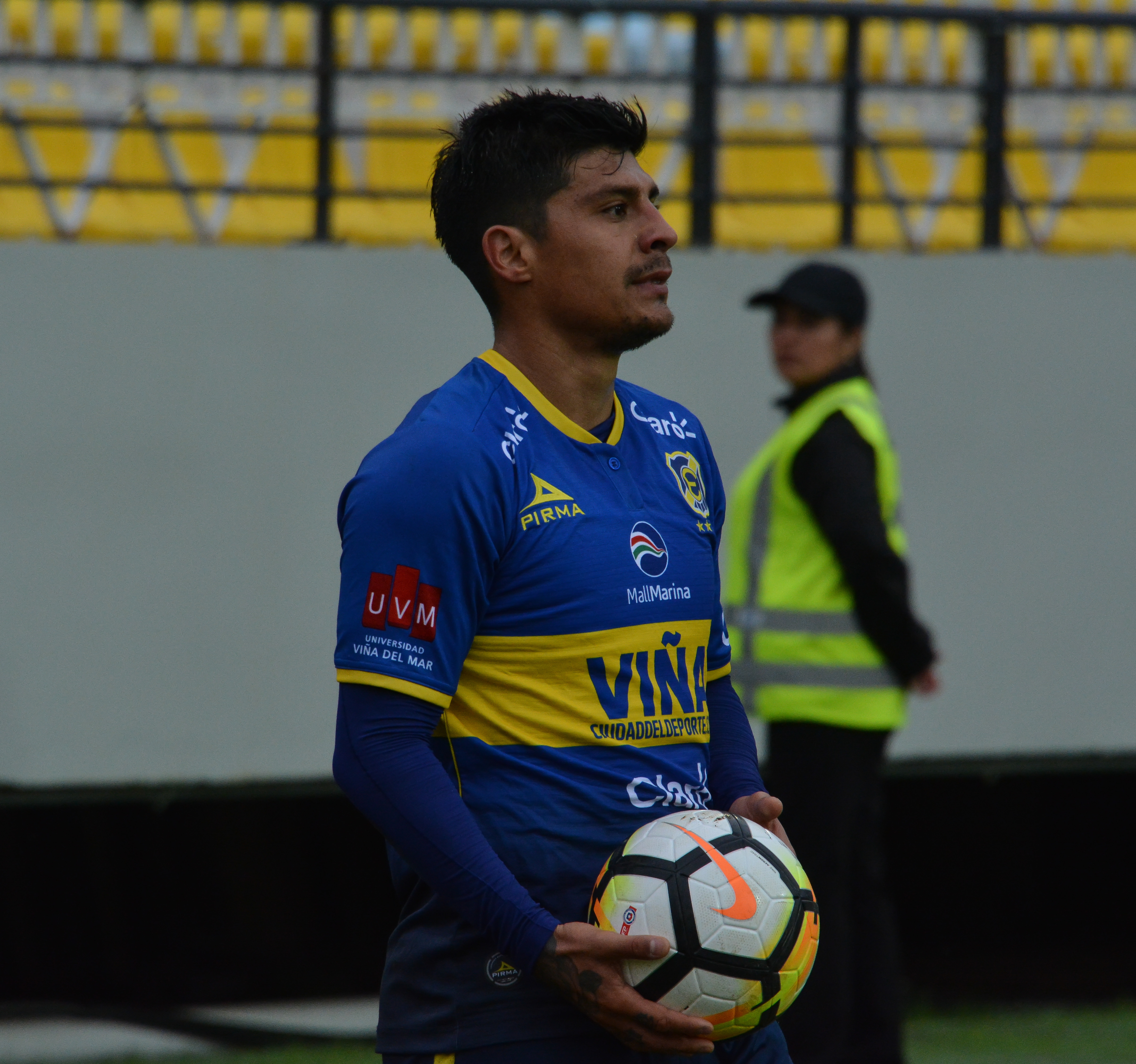 Everton v Unión Española, Estadio Sausalito, Viña del Mar, Chile.